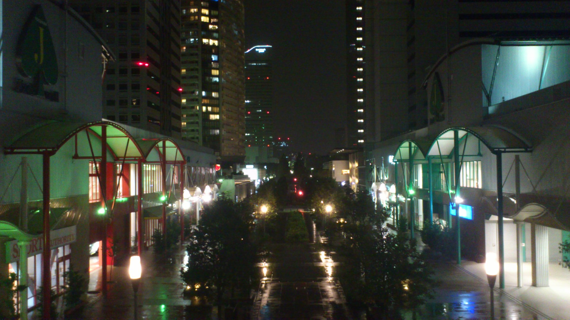 夜のジャックモール。2012年9月30日の営業終了日。